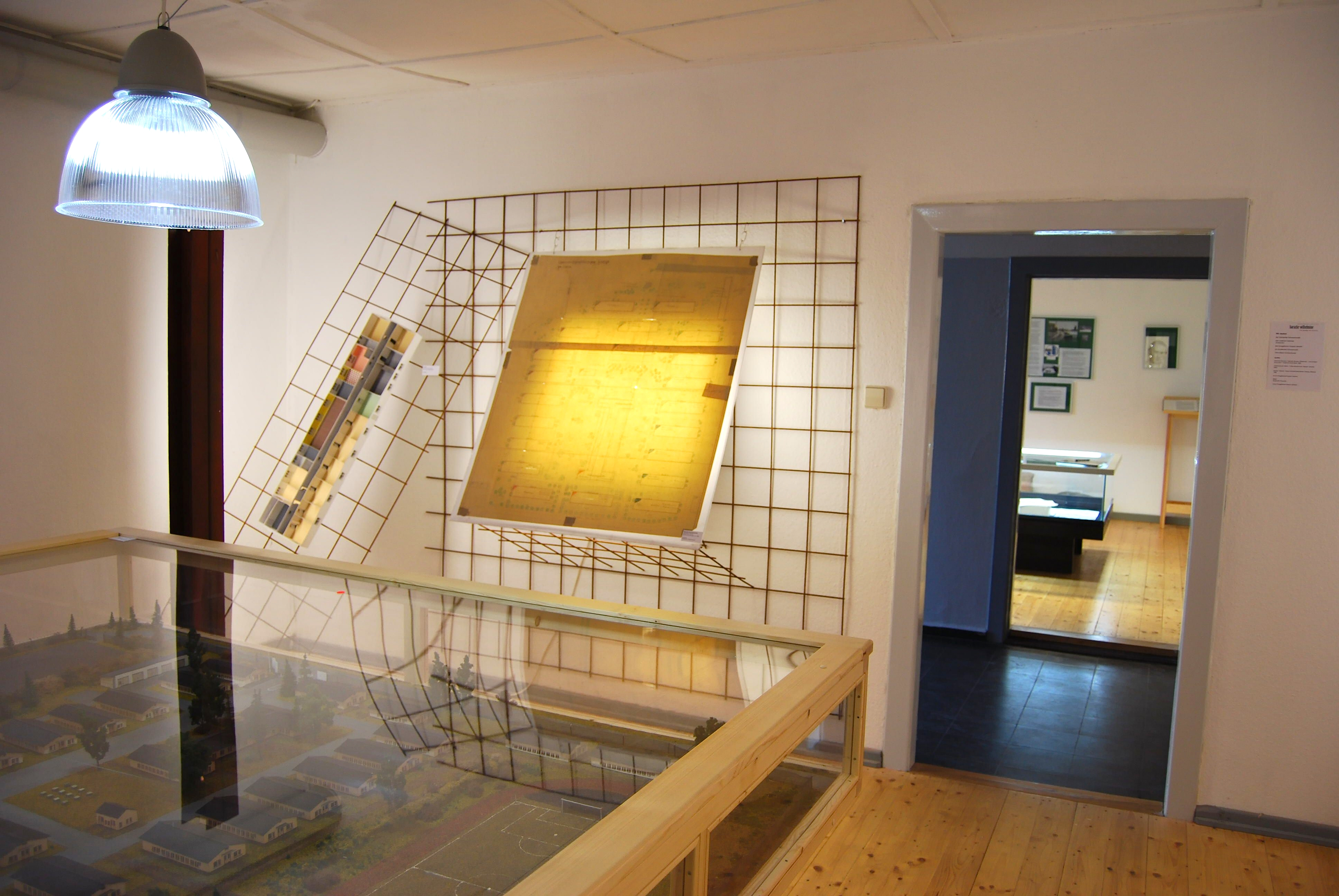 Einführungsraum in der Gedenkstätte Baracke Wilhelmine in Schwanewede-Neuenkirchen in Niedersachsen/Deutschland.